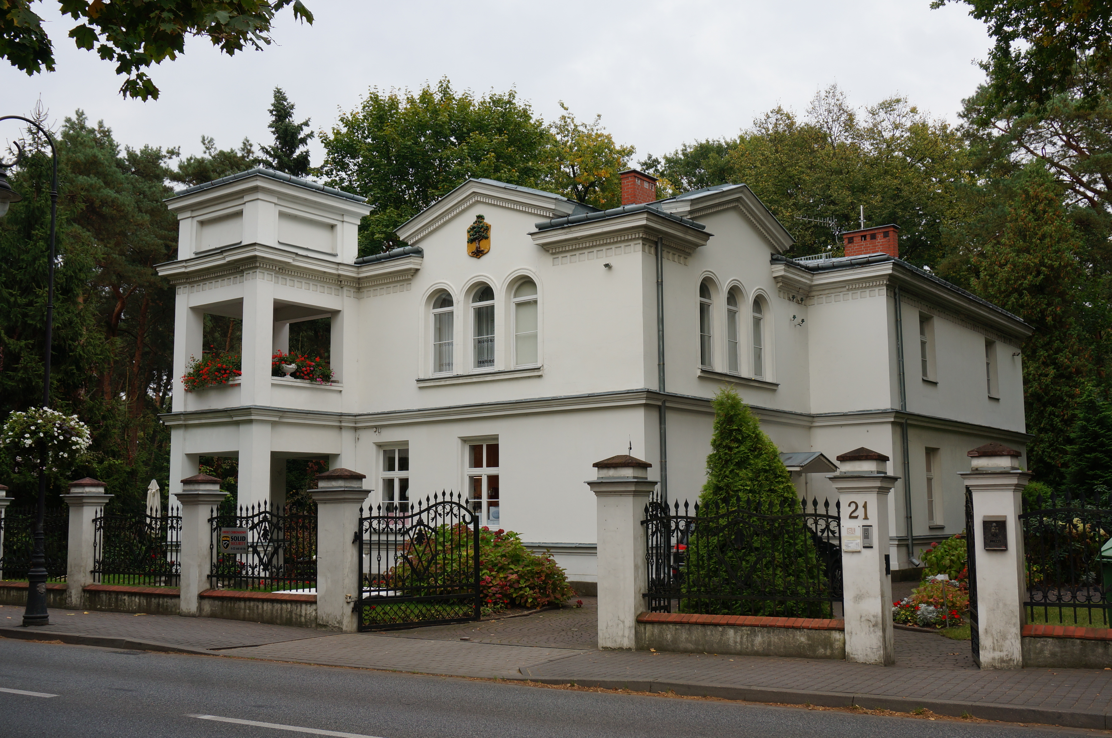 Konstancin-Jeziorna, zespół willi POD DĘBEM, 1904